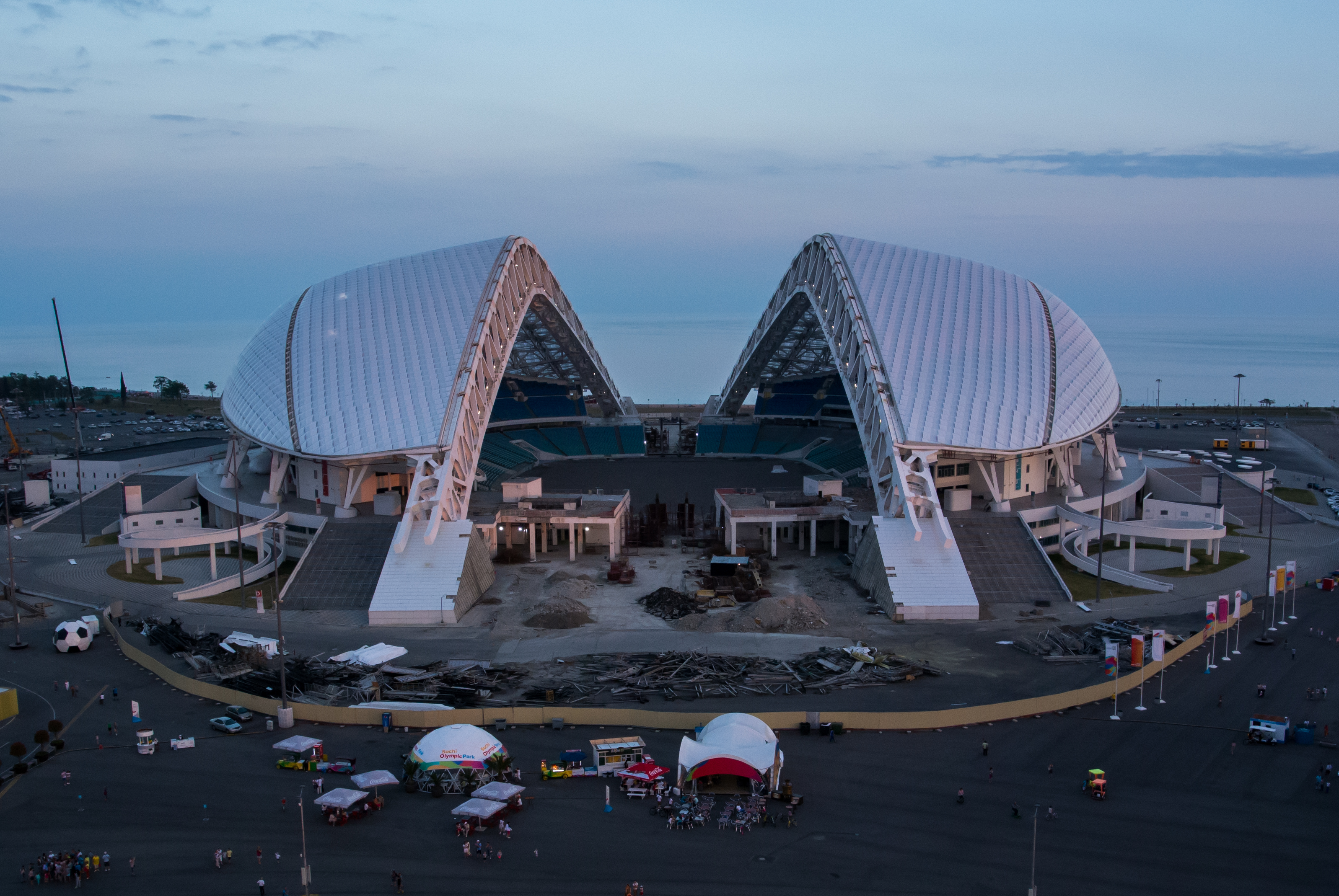 Футбольный стадион Фишт на реконструкции